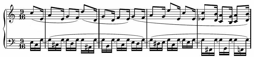 Description : première variation de l'arietta de la sonate pour piano n° 32 de Beethoven Auteur : propre travail réalisé avec Lilypond Licence : domaie public (auteur décédé depuis plus de 70 ans)